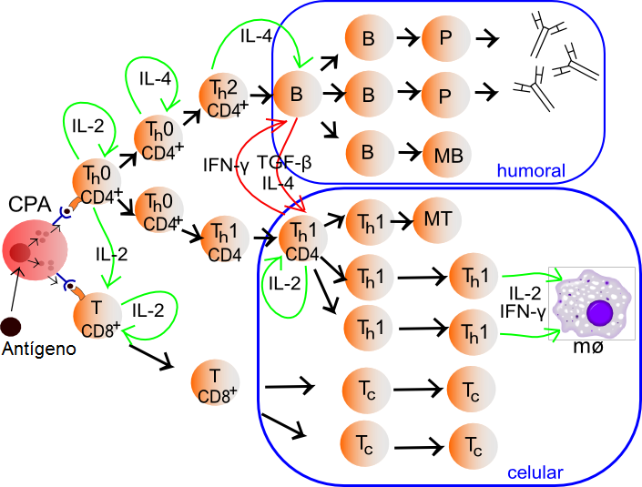 Activación linfocitaria